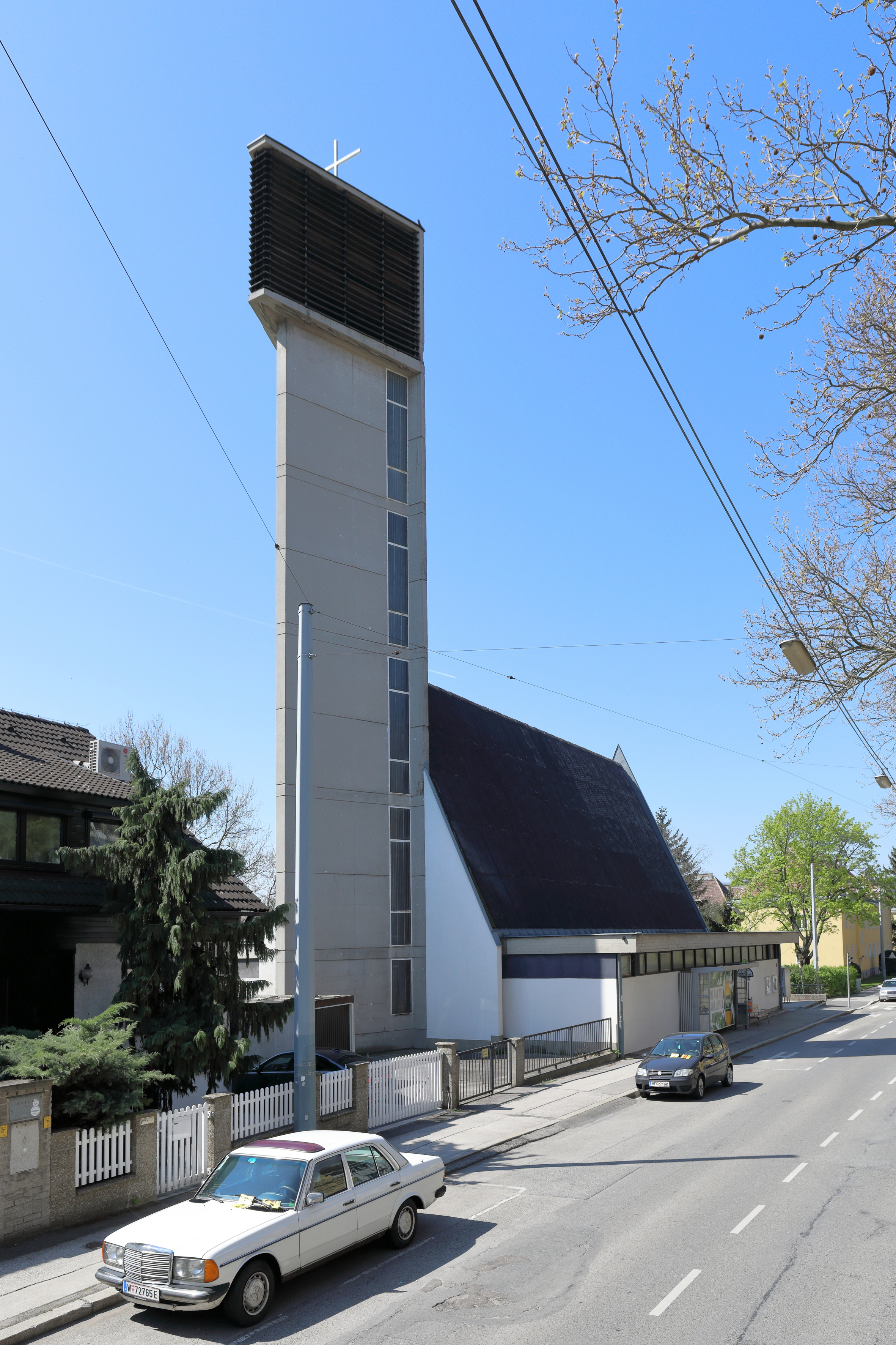 Nordostansicht der Pfarrkirche St. Hemma im 13. Wiener Gemeindebezirk Hietzing. Die Kirche wurde nach Plänen von Erwin Plevan errichtet. Die Grundsteinlegung fand am 2. Okt. 1964 statt und die Einweihung am 25. Sep. 1966. Mit 1. Jänner 1967 wurde die Pfarre von der Invalidenhauskirche an die neue Kirche verlegt. Aus der Pfarre St. Johann am Fasangarten wurde die Pfarre St. Hemma.